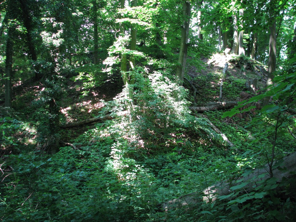 Hirschburg an der Bergstraße in Hirschberg-Leuterhausen